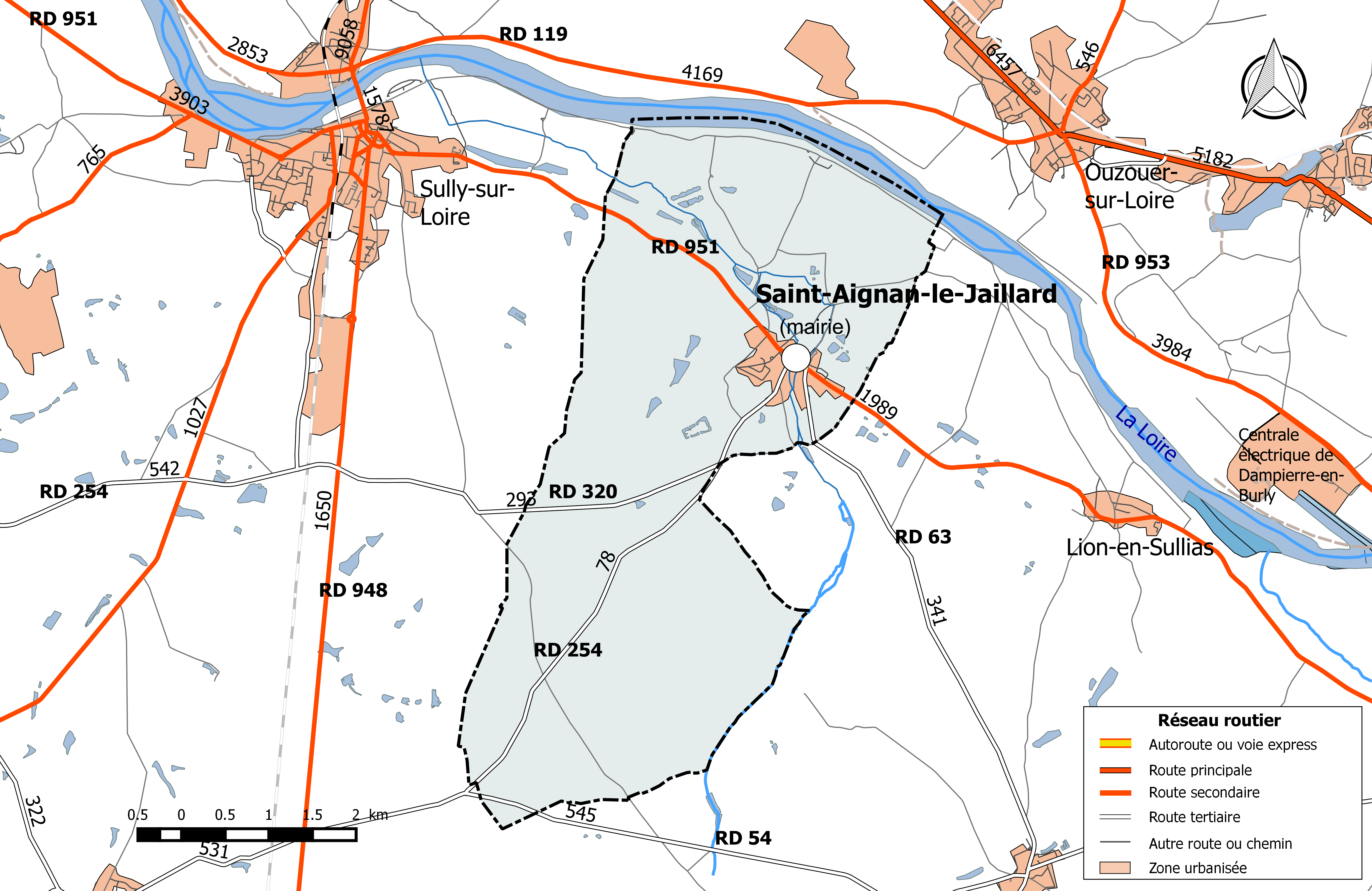 Carte du réseau routier de la commune de Saint-Aignan-le-Jaillard.